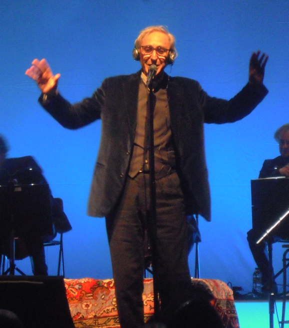 Franco Battiato en concerto no Teatro Circo Price de Madrid